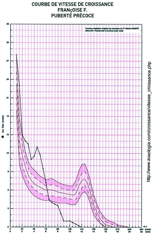 Courbe de vitesse de croissance : François F. = puberté précoce.